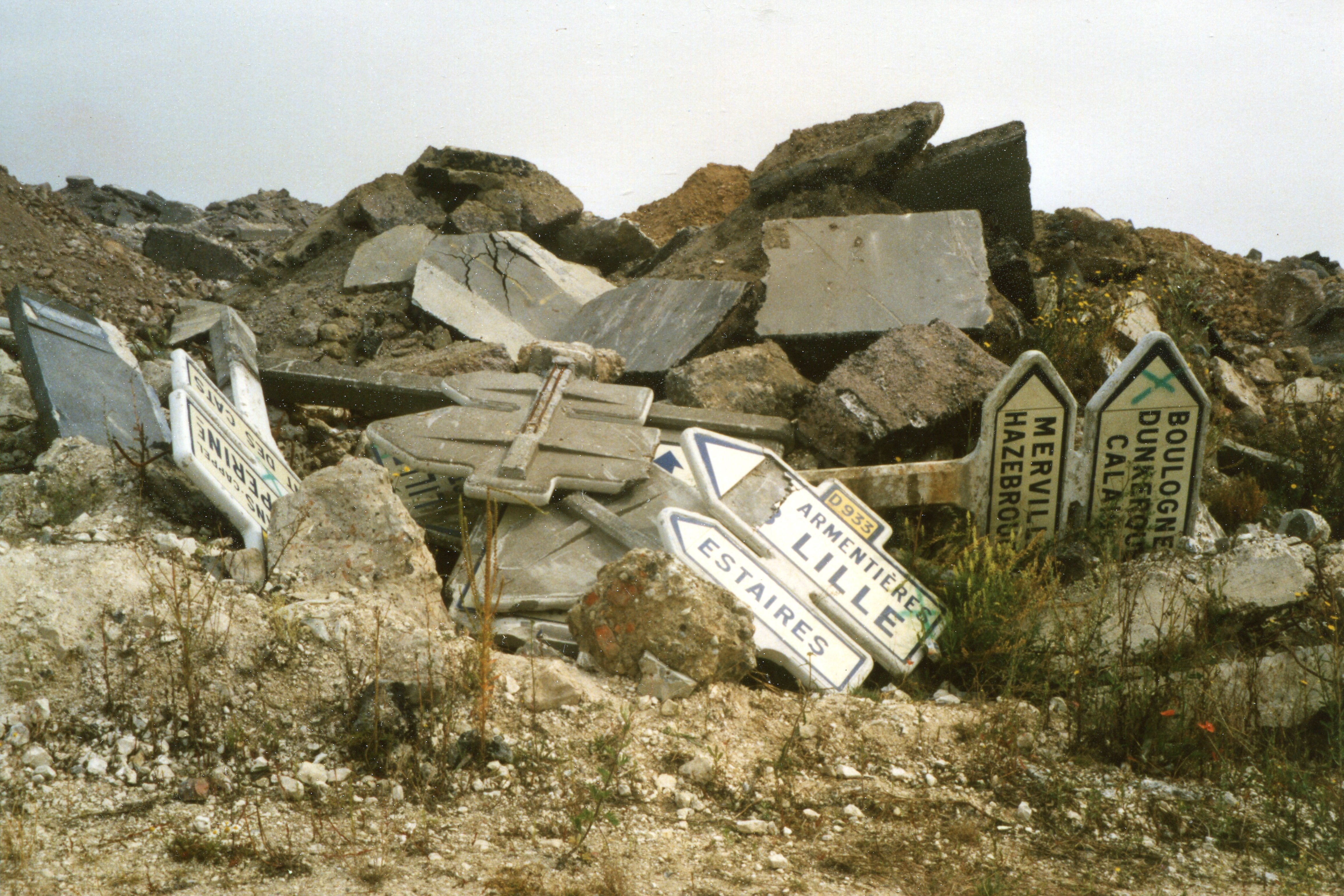 Cimetière de panneaux Michelin quelque part dans le Nord, juillet 1989